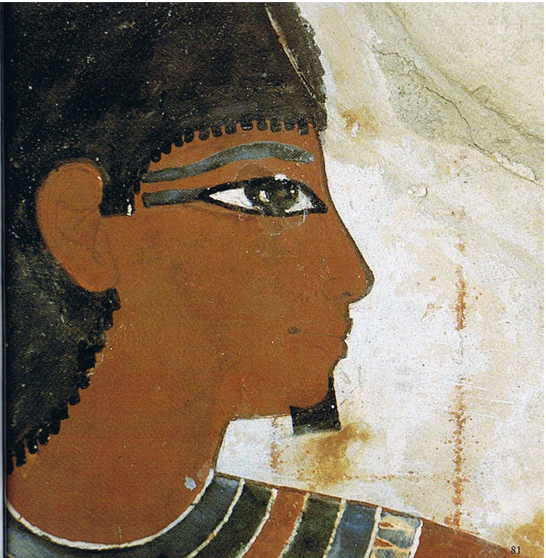 der Priesterbeamte Nacht